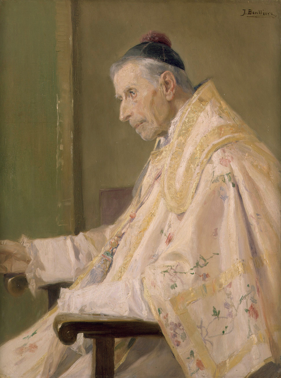 La obra representa a un sacerdote revestido para celebrar la Eucaristía.